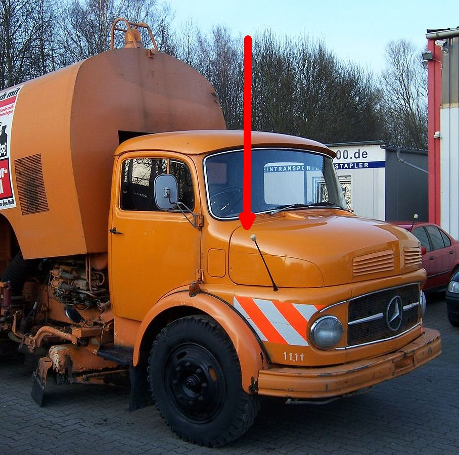 Mercedes Benz 1113 (1965), Ansicht vorne rechts, mit Peilstäben vorne rechts und vorne links, Peilstab mit Pfeil markiert